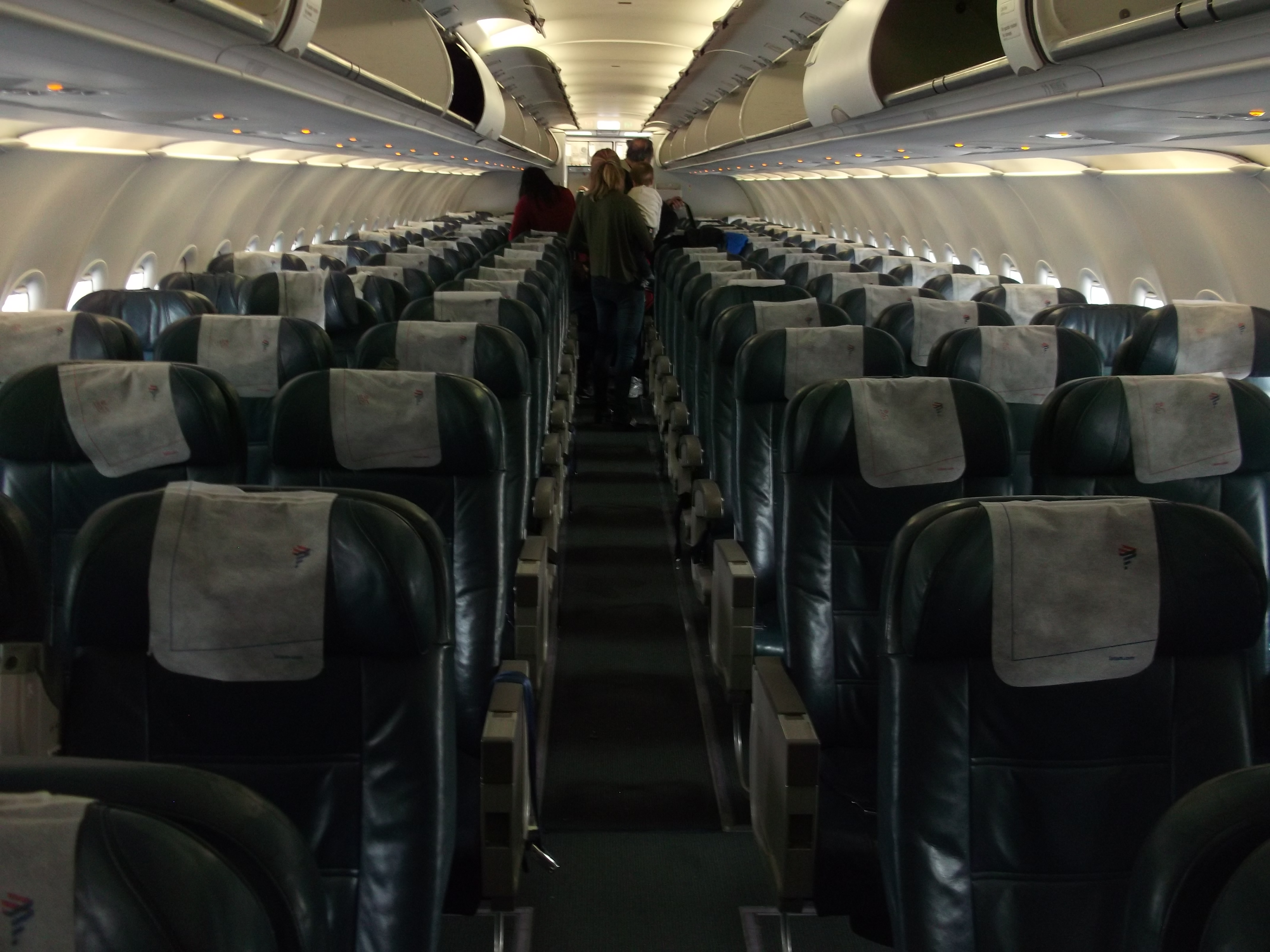 Der Innenraum von der A320 von LATAM Airlines, etwa von der Mitte des Flugzeuges nach hinten hin gesehen